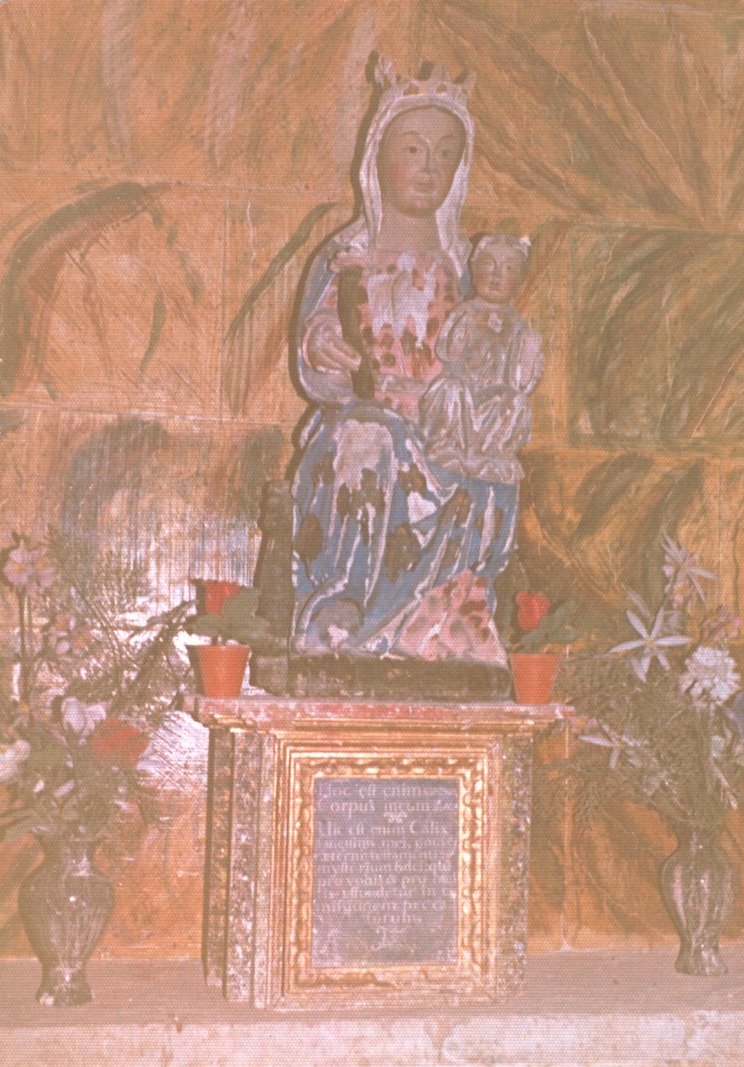 La Santa Rosa de la ermita de Reveche (desaparecida en 1977)